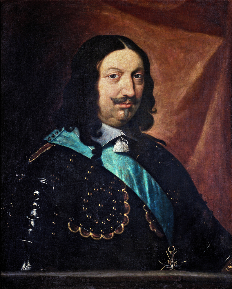 Portrait du prince Honore II (1597-1662)